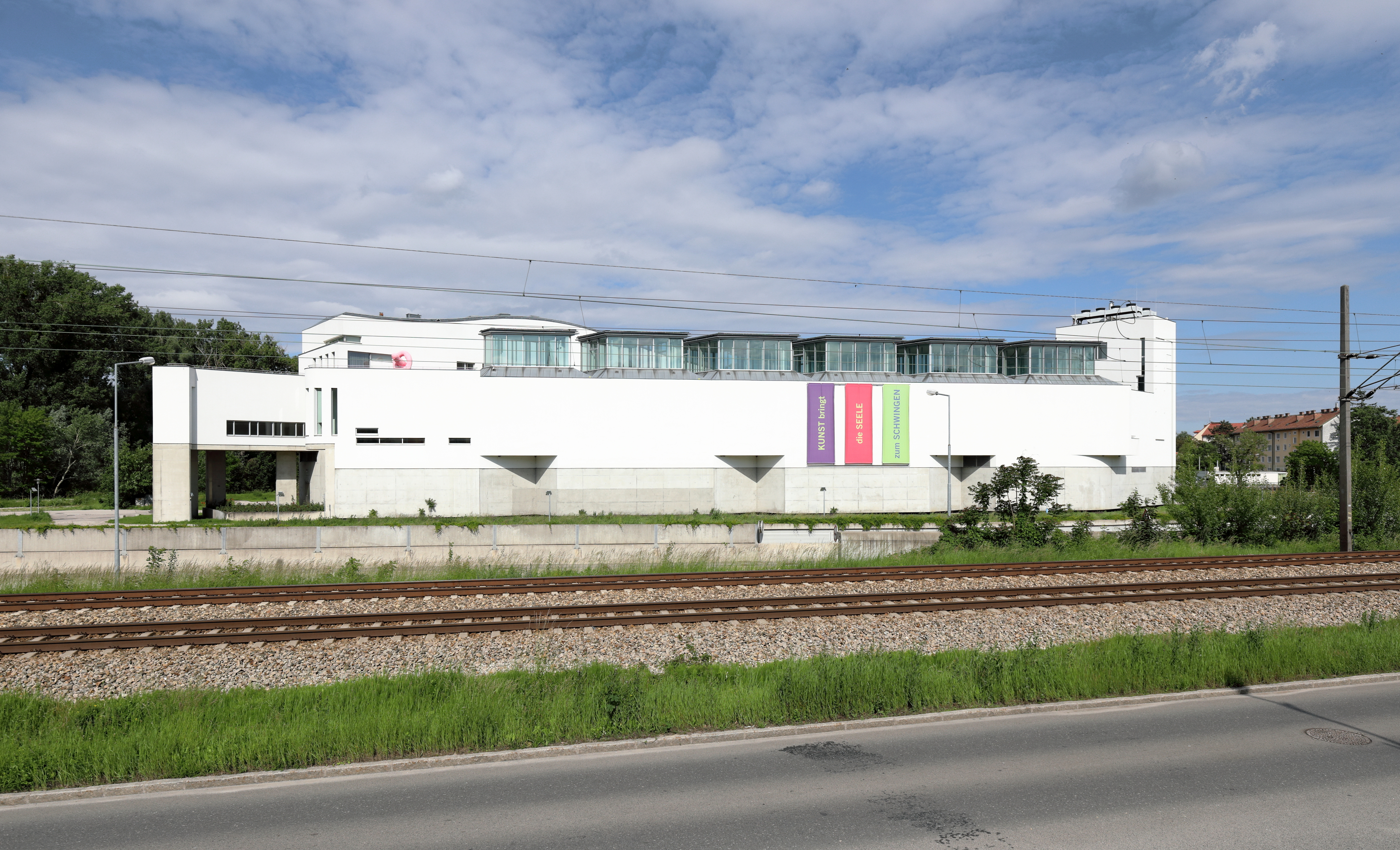 Westansicht des ehemaligen Essl Museum und jetziges Depot der Sammlung Essl in der niederösterreichischen Marktgemeinde Klosterneuburg.Das Museumgebäude, prämiert mit dem Österreichischen Bauherrenpreis 2000, wurde nach Plänen des Architekten Heinz Tesar errichtet und 1999 eröffnet. Seit 2016 dient das Gebäude als Depot, nachdem der Museumbetrieb eingestellt wurde und die Sammlung Essl der Albertina als Dauerleihgabe übergeben wurde.